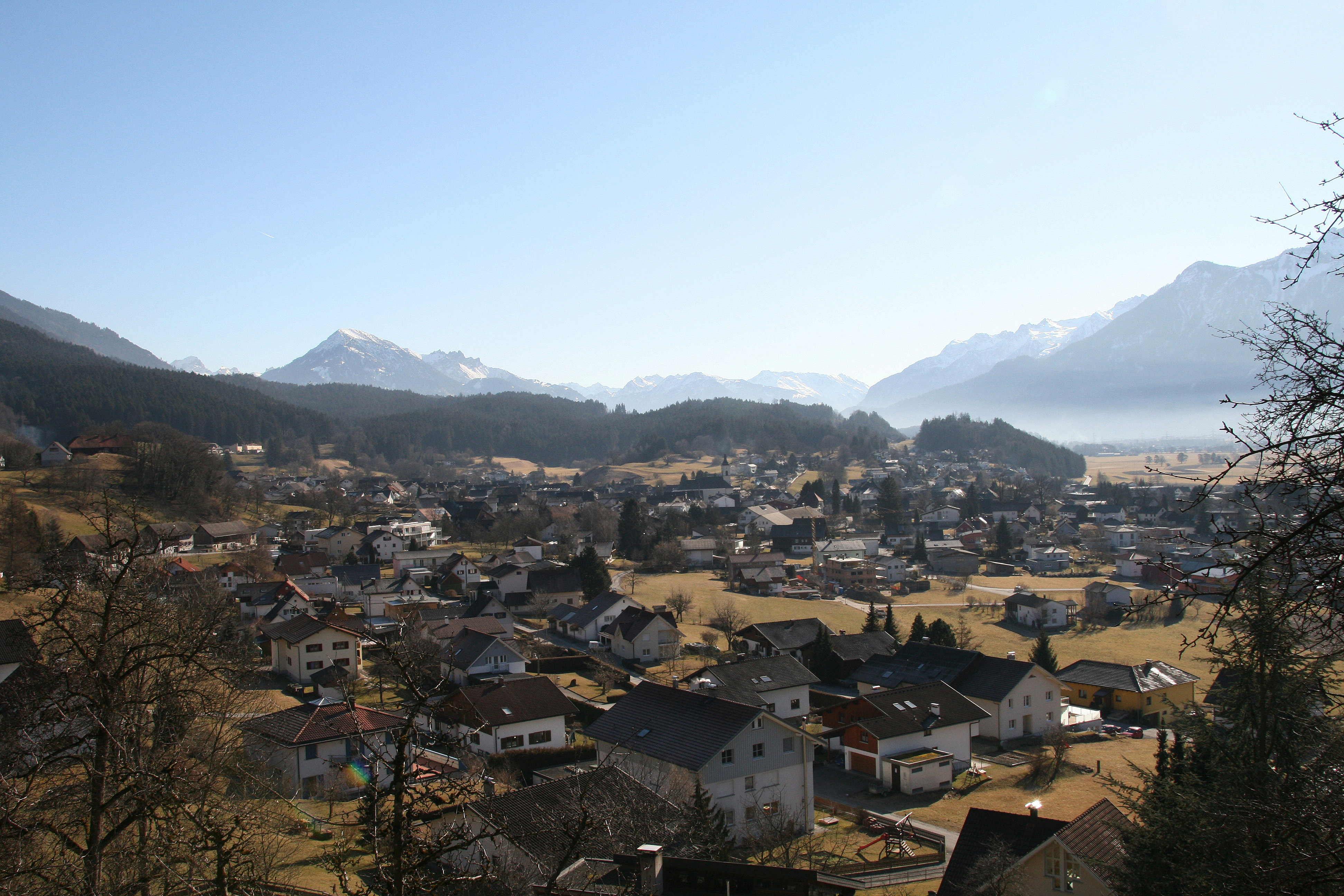 Satteins in Vorarlberg. Blick von der L50 an der Orsteinfahrt oberhalb vom Römerweg.